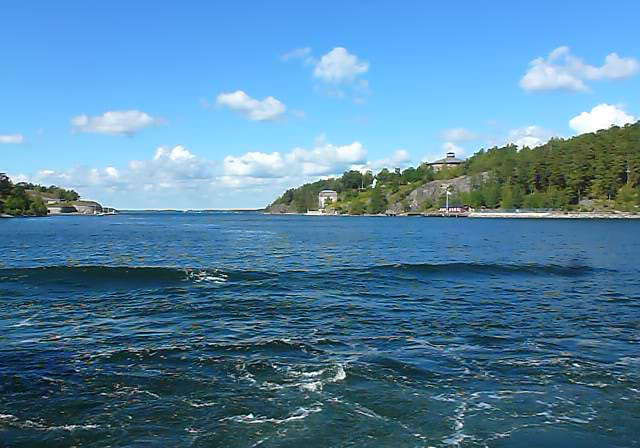 På Oxdjupsleden